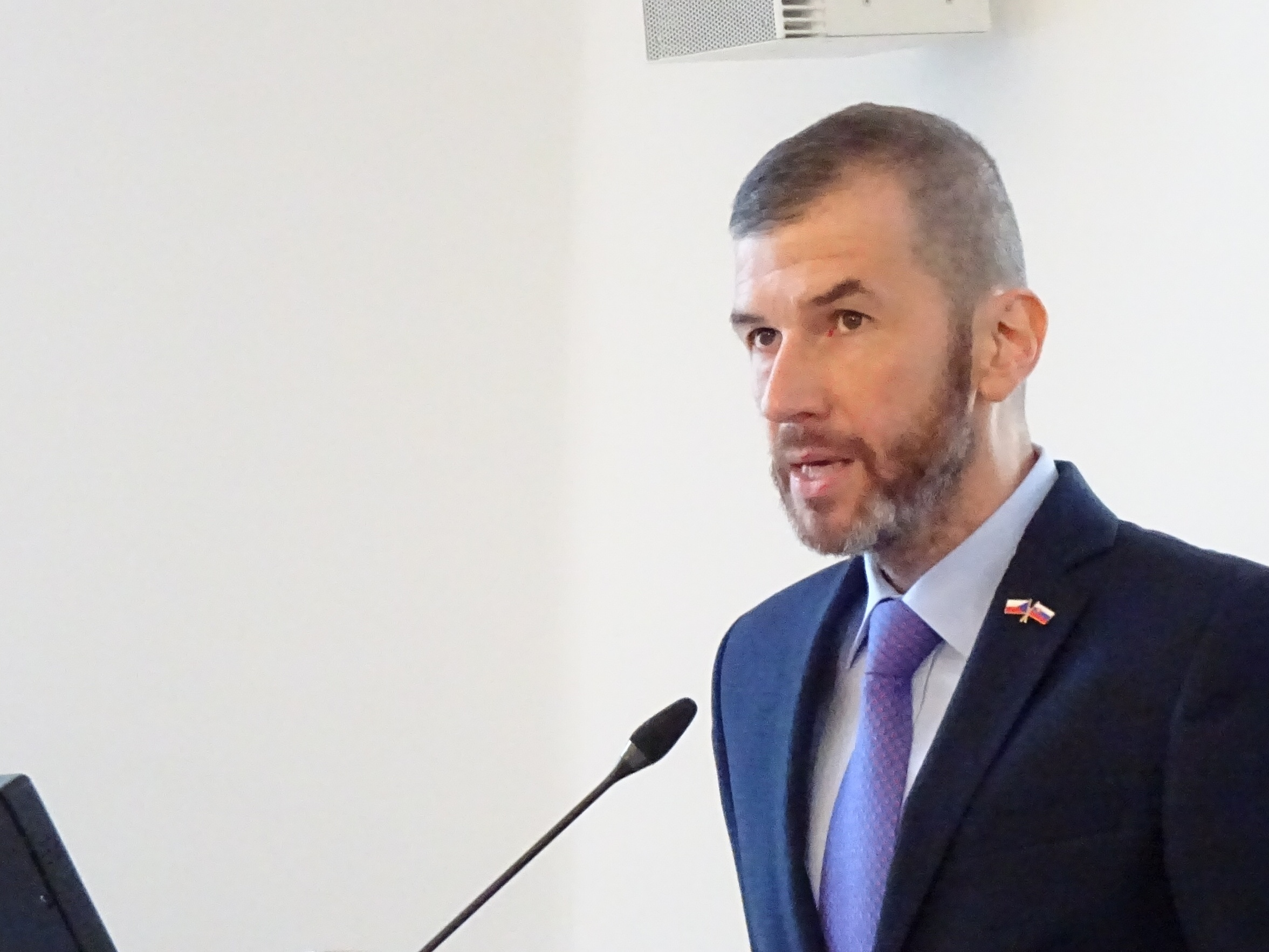 Novinářská konference 14. 8. 2018. Autor: Lucie Borová (Emma Orphe) pro Kritiky.cz